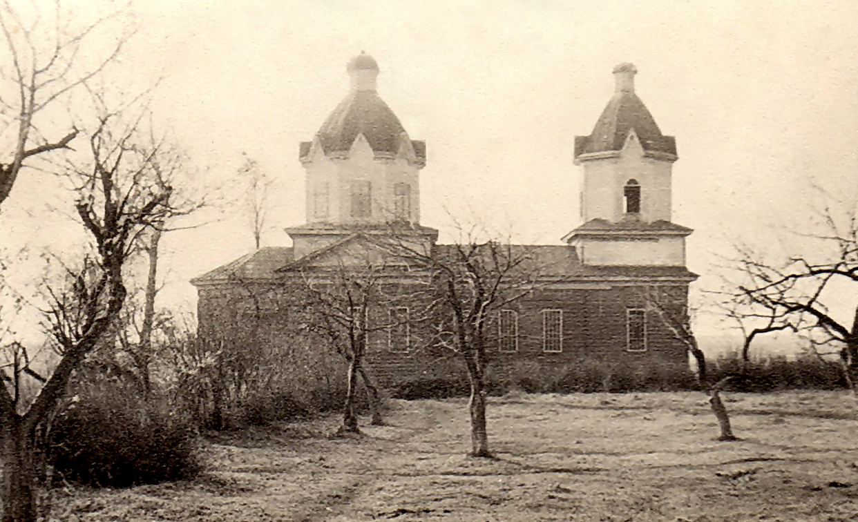 Церковь Покрова Пресвятой Богородицы, которая в свое время располагалась в Меленске (ныне Стародубский район Брянской области России)